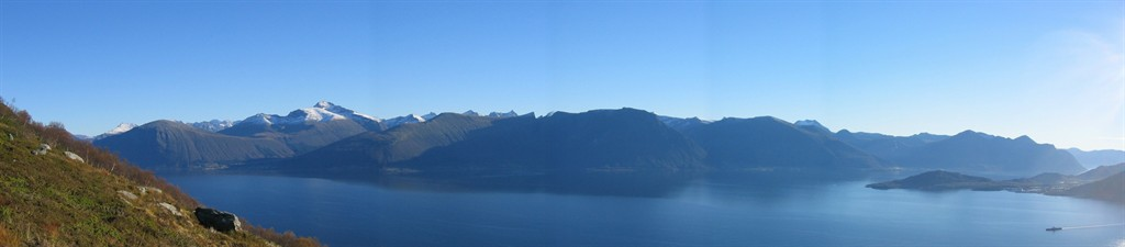 Vartdalsstranda, Ørsta, Sunnmøre, Norway